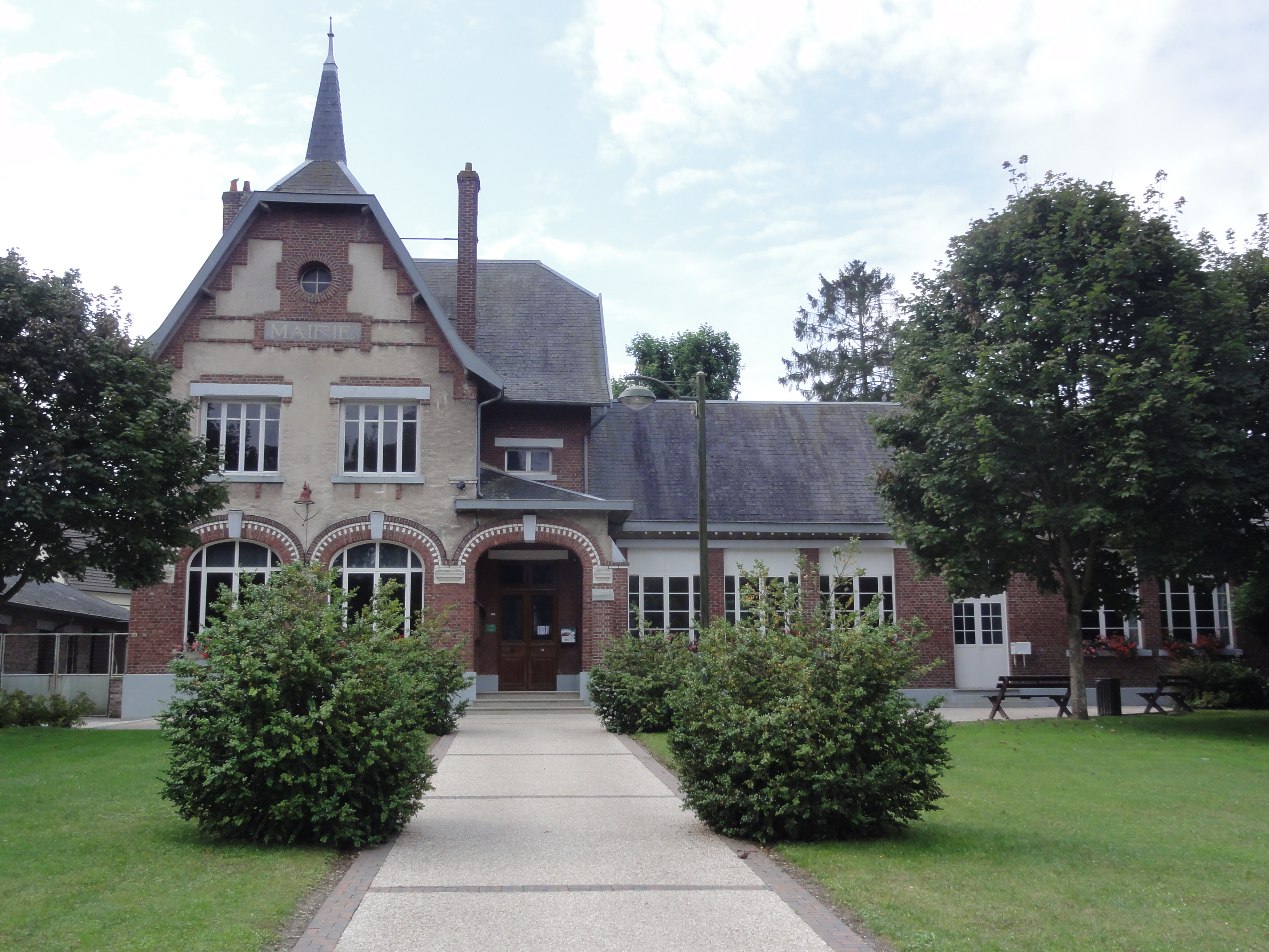 Artemps (Aisne) mairie-école